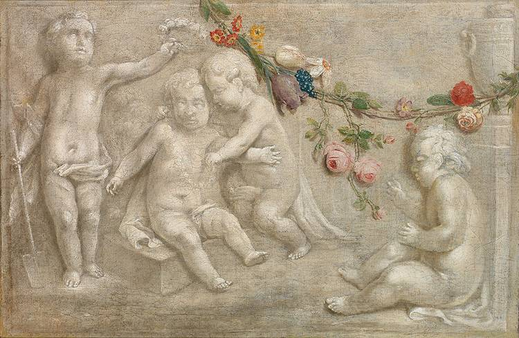 Putti als Allegorie des Herbstes, Grisaille, Öl auf Leinwand, 63 x 96 cm